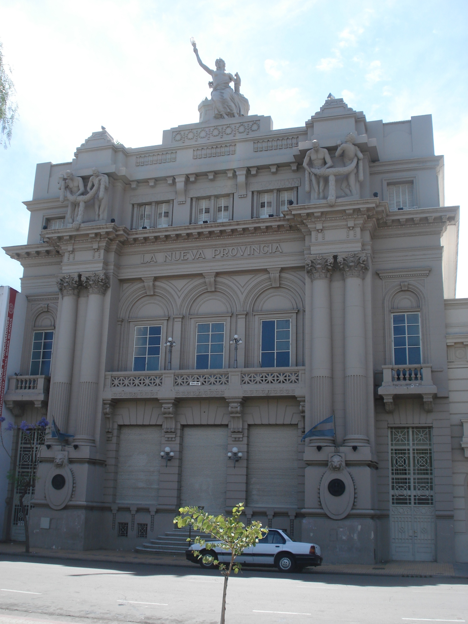 Sede del Colegio de Abogados (ex diario La Nueva Provincia)